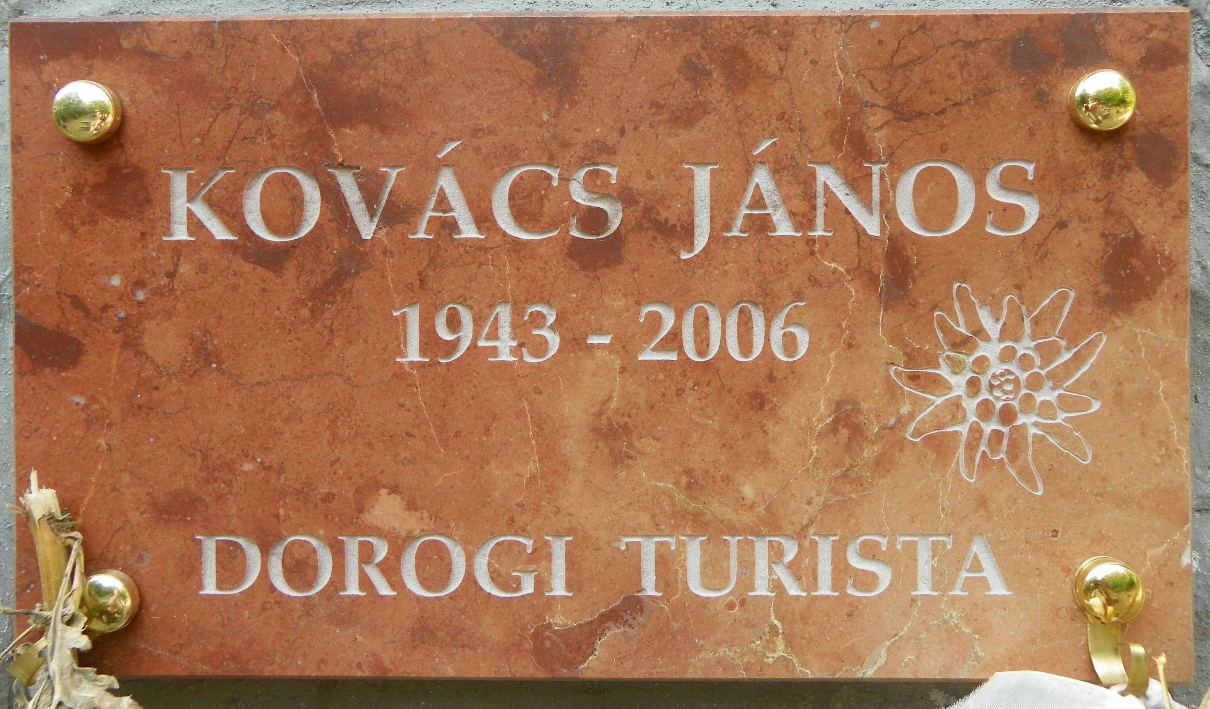 Emléktábla a Sasfészek turistaházon